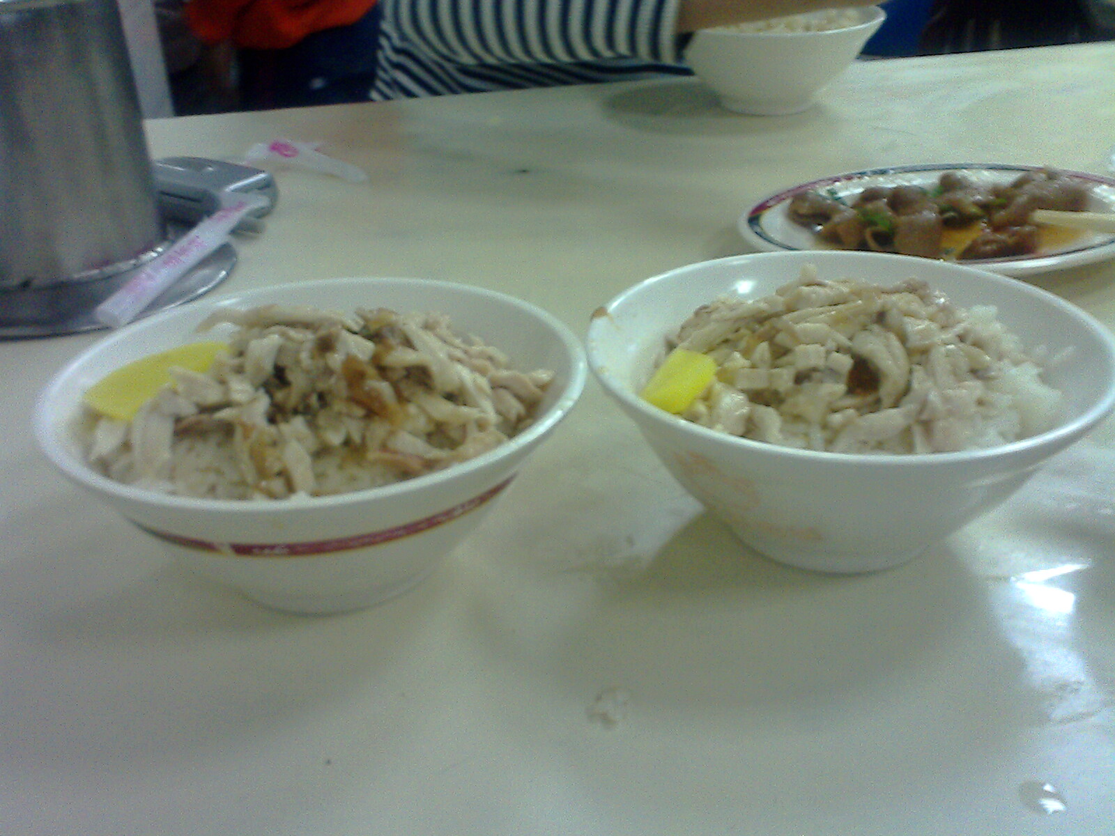 嘉義噴水火雞肉飯。